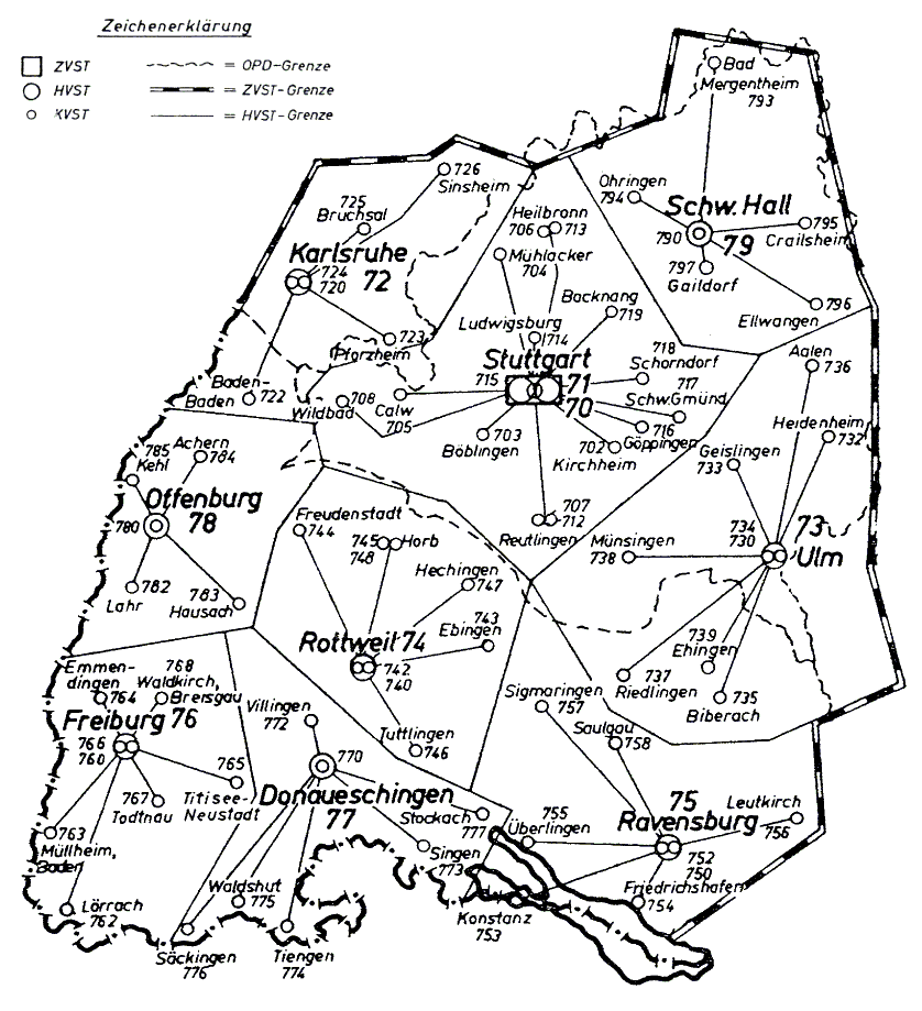 Vorwahlgebiet 07 in Deutschland mit der Zentralvermittlungsstelle (ZVSt), den Hauptvermittlungsstellen (HVSt) und den Knotenvermittlungsstellen (KVSt)